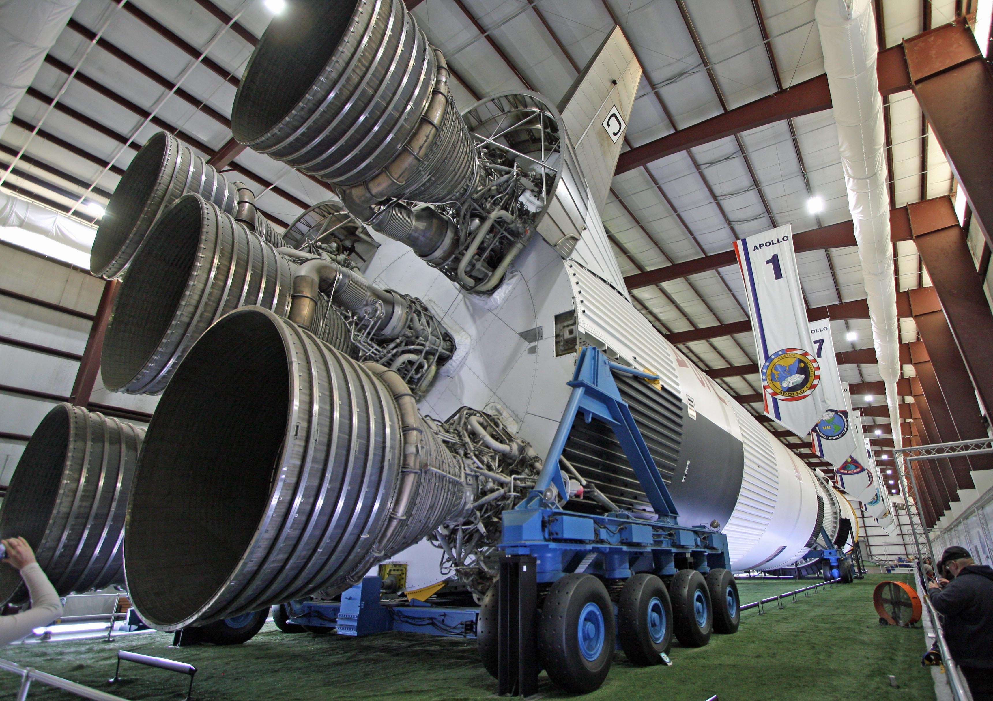 JSC Houston, December 18, 2018